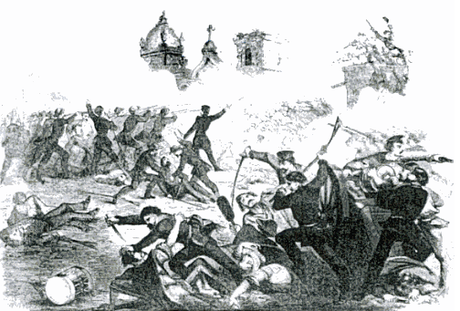 Grabado de la batalla de Rivas aparecido en el Frank Leslie's Illustrated Newspaper de Nueva York en junio de 1856.